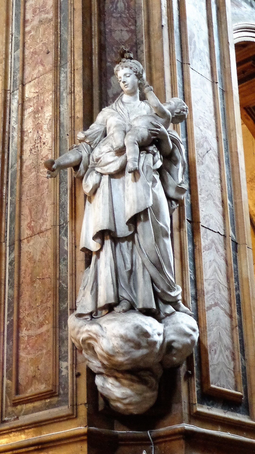 Statua in stucco Carità pilastro della crociera.